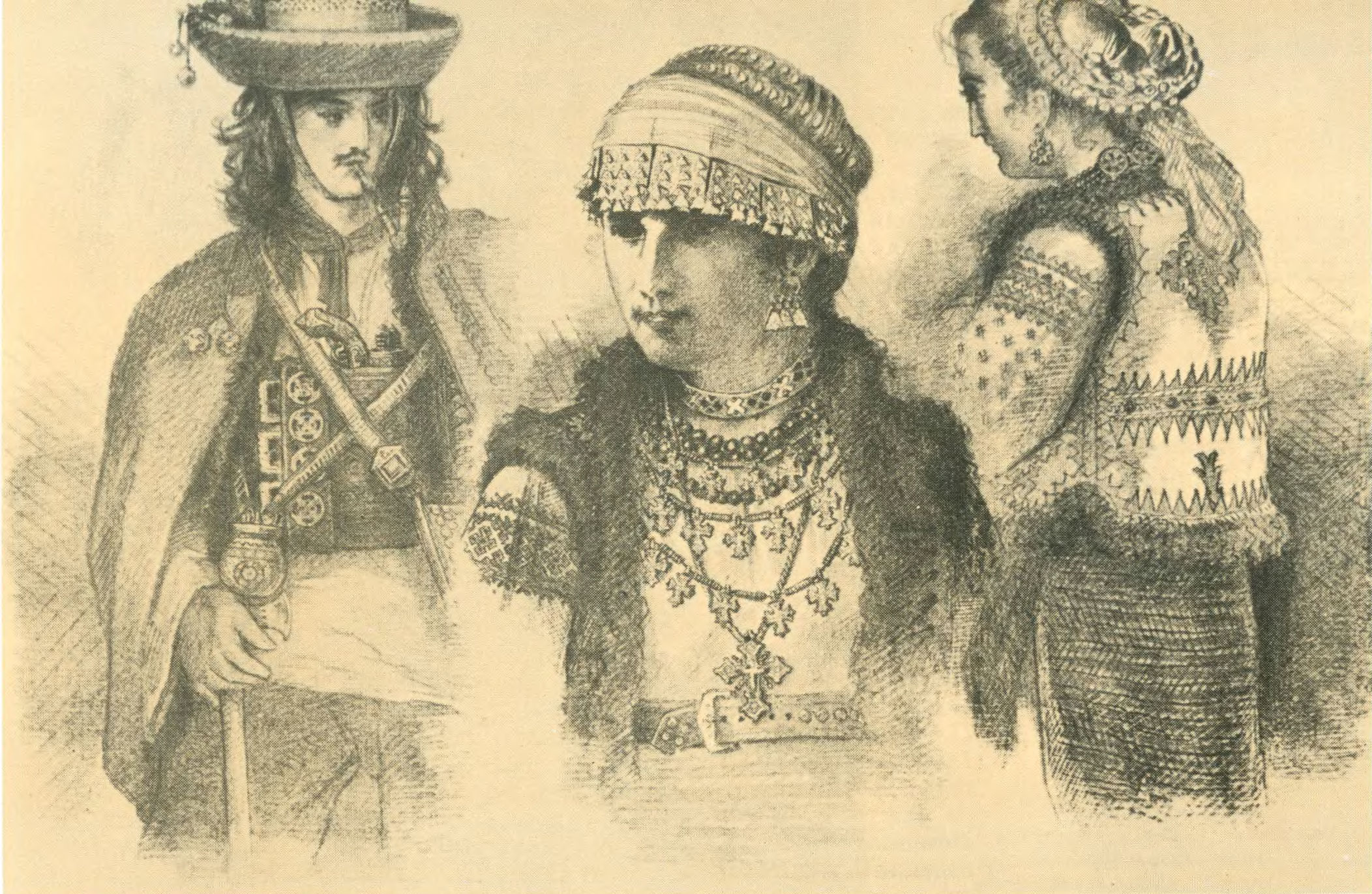 Гуцули у традиційних прикрасах